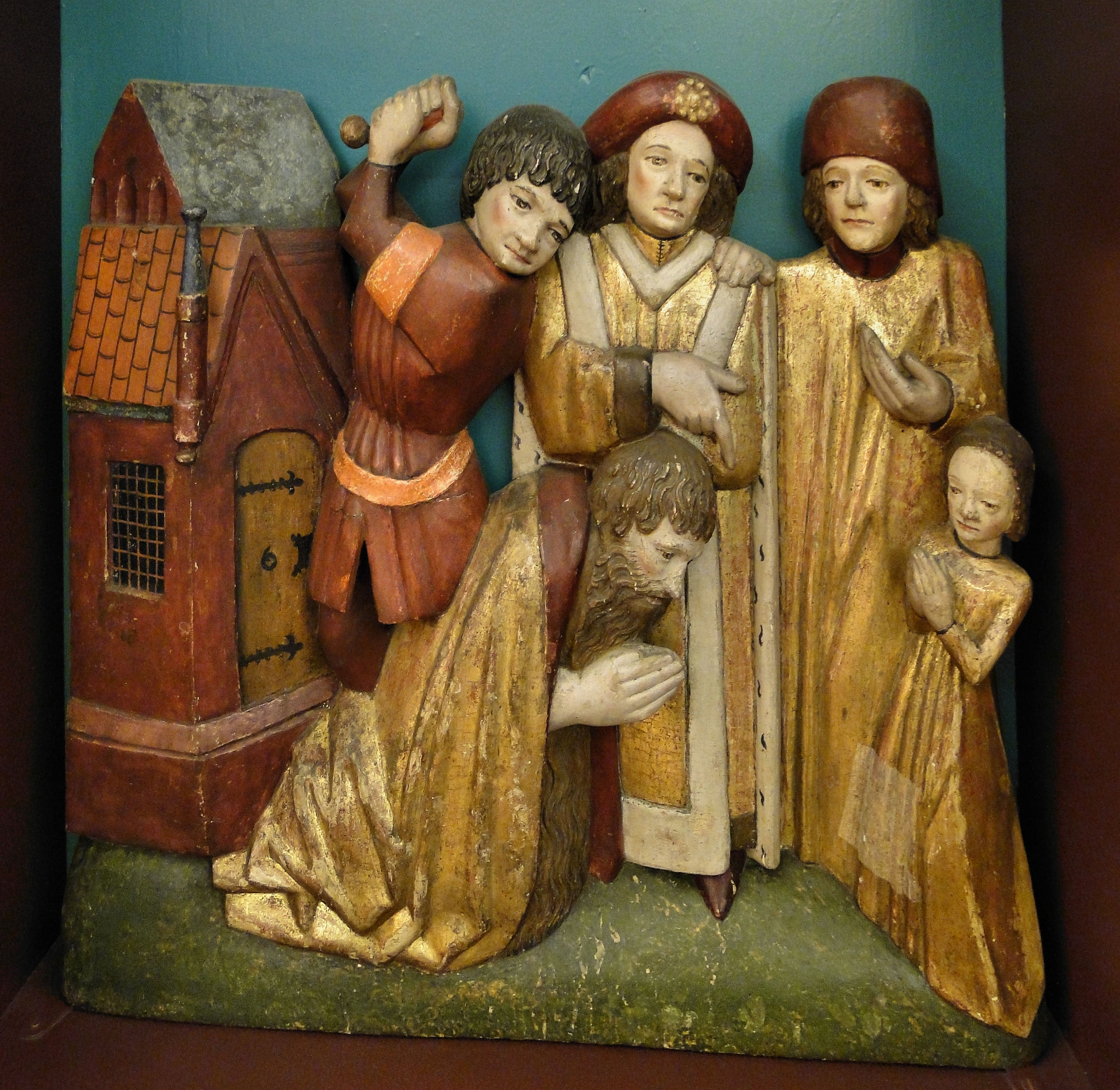 Dawny ołtarz główny z kościoła św. Jana w Stargardzie Szczecińskim. Obecnie eksponowany w Muzeum Narodowym w Szczecinie.